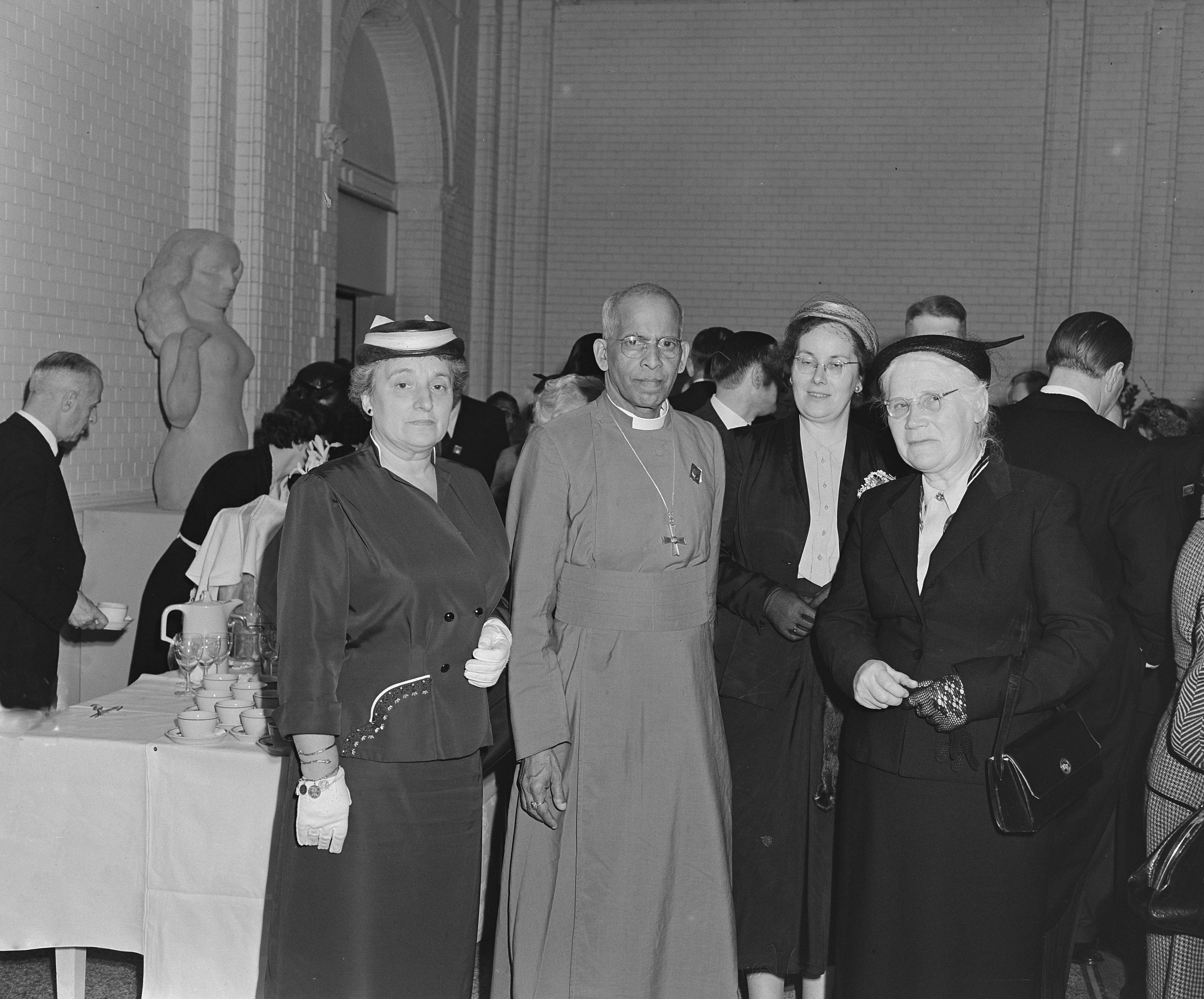 Collectie / Archief : Fotocollectie Anefo Reportage / Serie : [ onbekend ] Beschrijving : 140 jarig bestaan Nederlandse Bijbelgenootschap, receptie Stedelijk Museum Datum : 15 juni 1954 Fotograaf : Rossem, Wim van / Anefo Auteursrechthebbende : Nationaal Archief Materiaalsoort : Glasnegatief Nummer archiefinventaris : bekijk toegang 2.24.01.09 Bestanddeelnummer : 906-5267